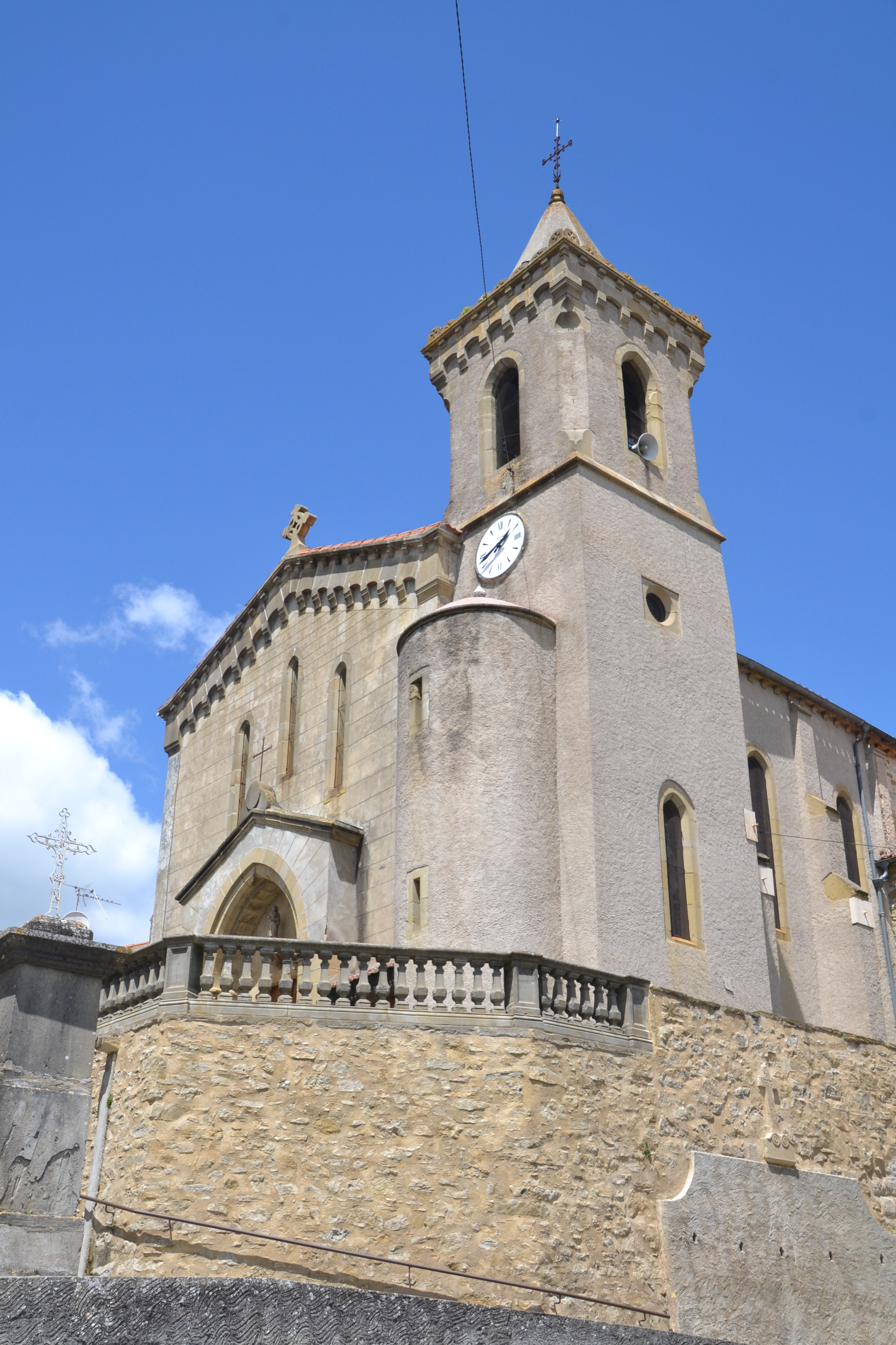 Église Saint-Saturnin d'Escueillens, commune d'Escueillens-et-Saint-Just-de-Bélengard (Aude, France).